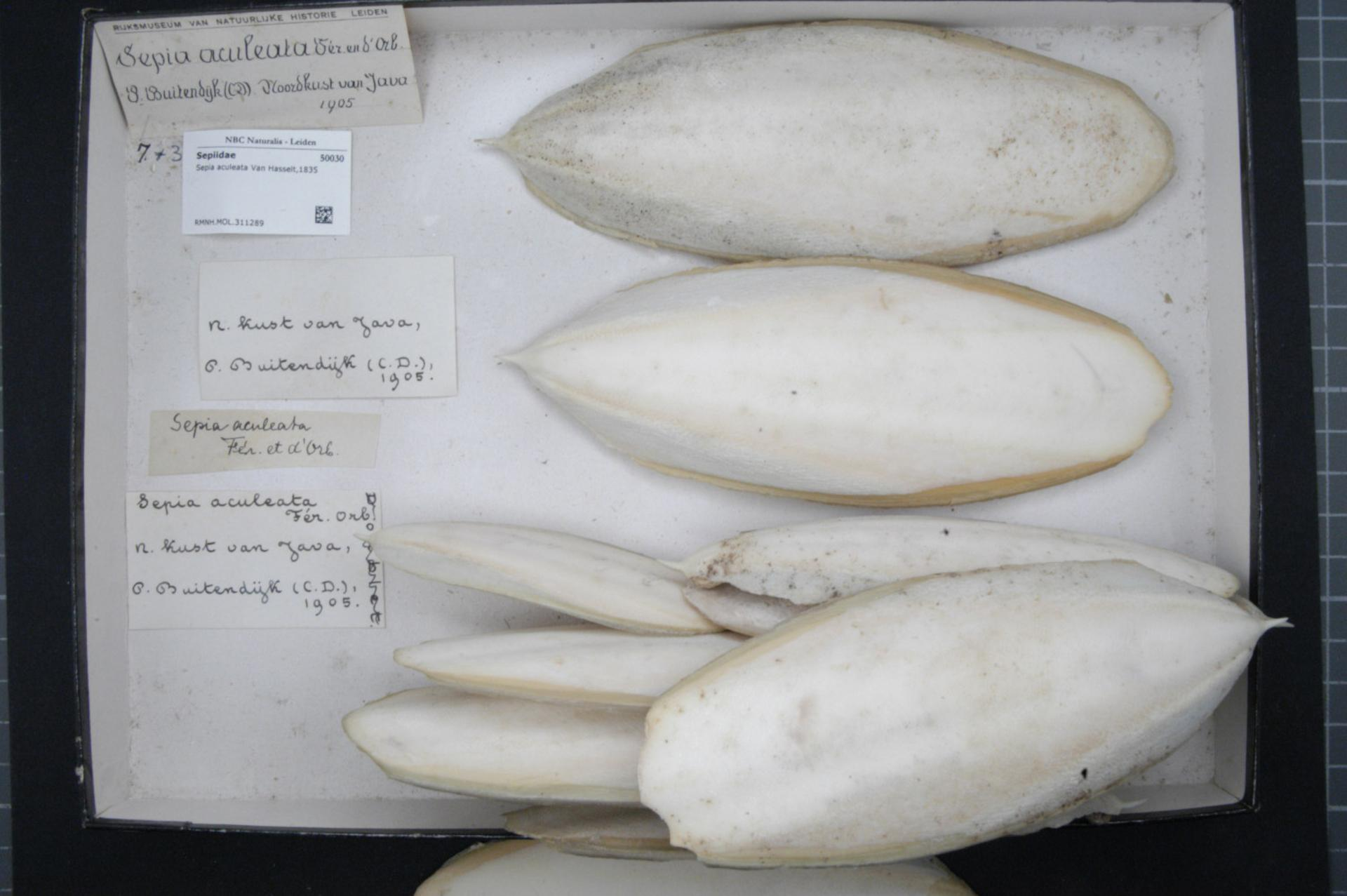 Sepia aculeata Van Hasselt,1835